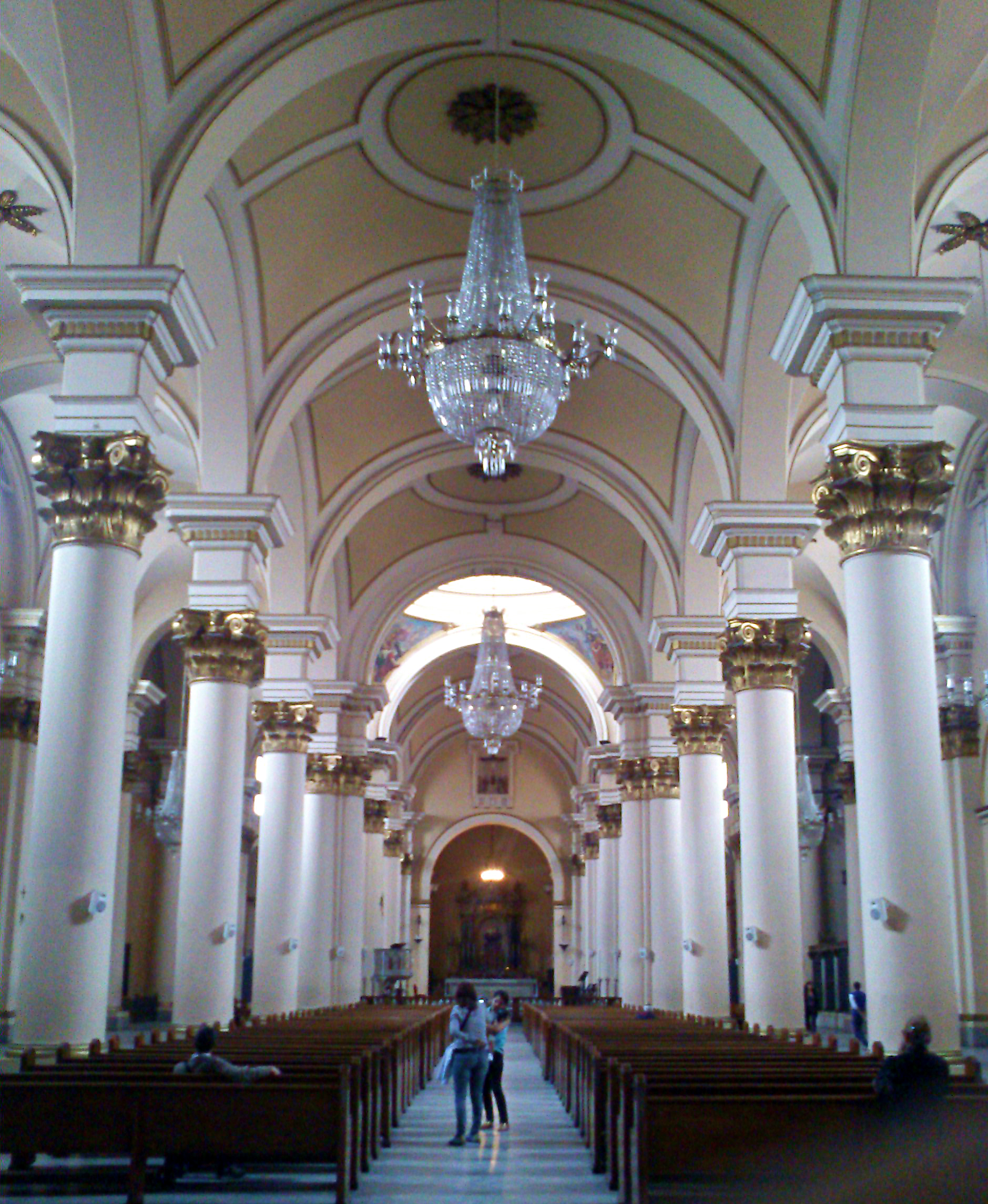 Nave central de la Catedral primada de Colombia